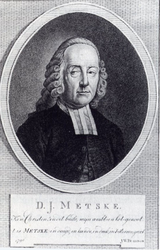 portret van de Goudse predikant ds. D.J. Metske (1733-1795), gravure van Hendrik Roosing (1763-1823), naar een portret van A. van den Berg